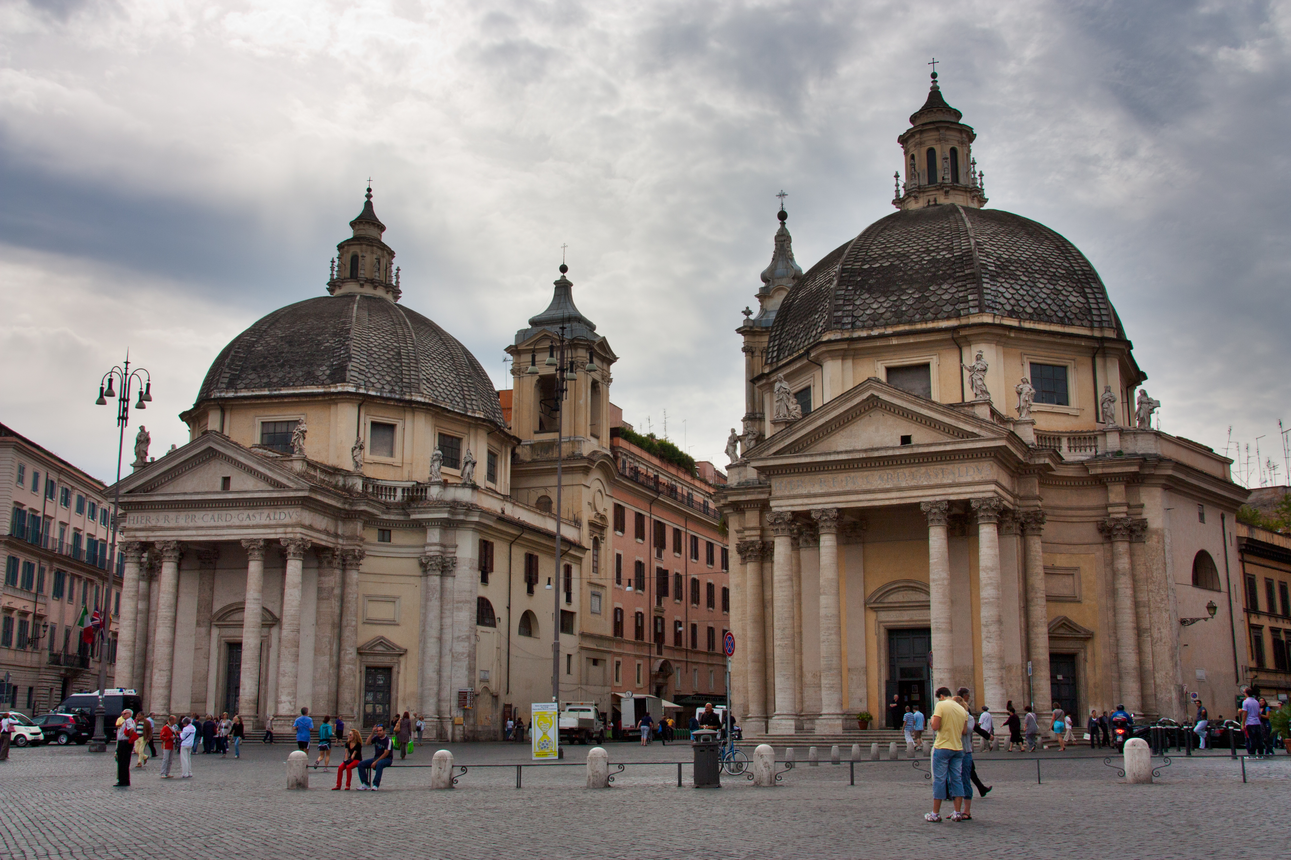 Las iglesias gemelas(Santa Maria dei Miracoli (1681) y Santa Maria in Montesanto (1679)) se encuentran en la Piazza del Popolo de Roma y son las antesalas de las Via del Corso, Via del Babuino y Via di Ripetta.